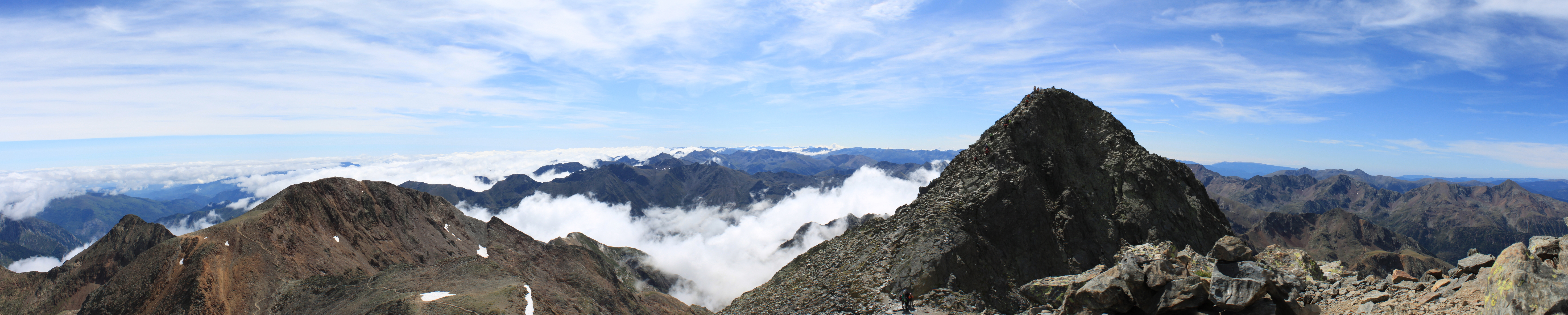 Panorámica de la Pica d'Estats(derecha) con el Montcalm a la izquierda tomada desde la base del Pic Verdaguer